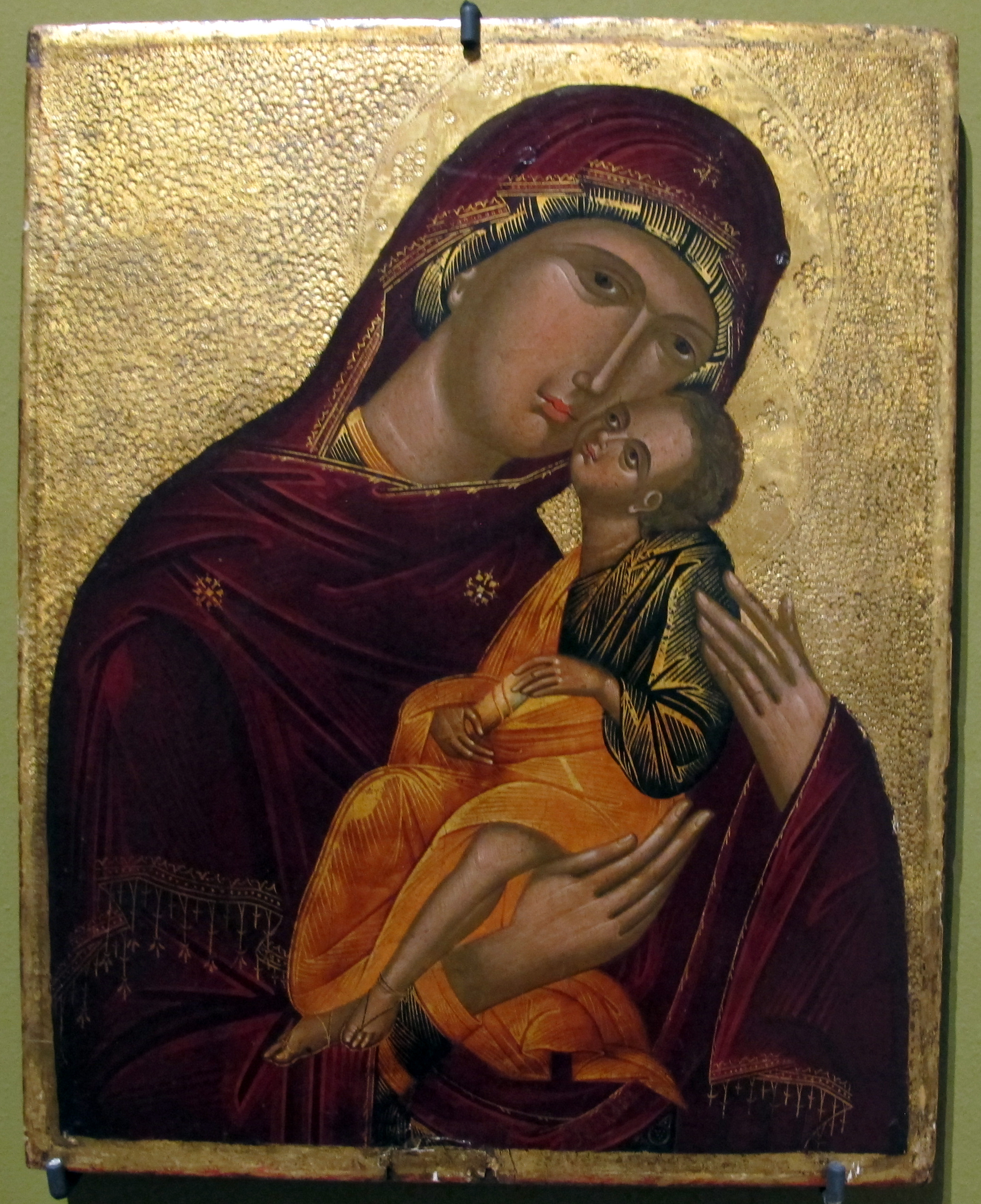 Musée d'art et d'histoire de Genève